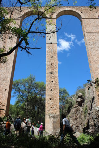 Paseos a caballo, contacto puro con la naturaleza